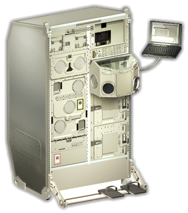 Biolab in Columbus-Modul